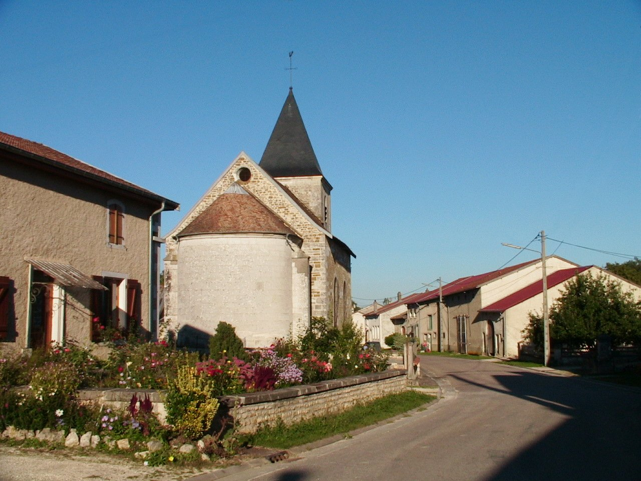 Eglise et village de Epiez-sur-Meuse (département de la Meuse)